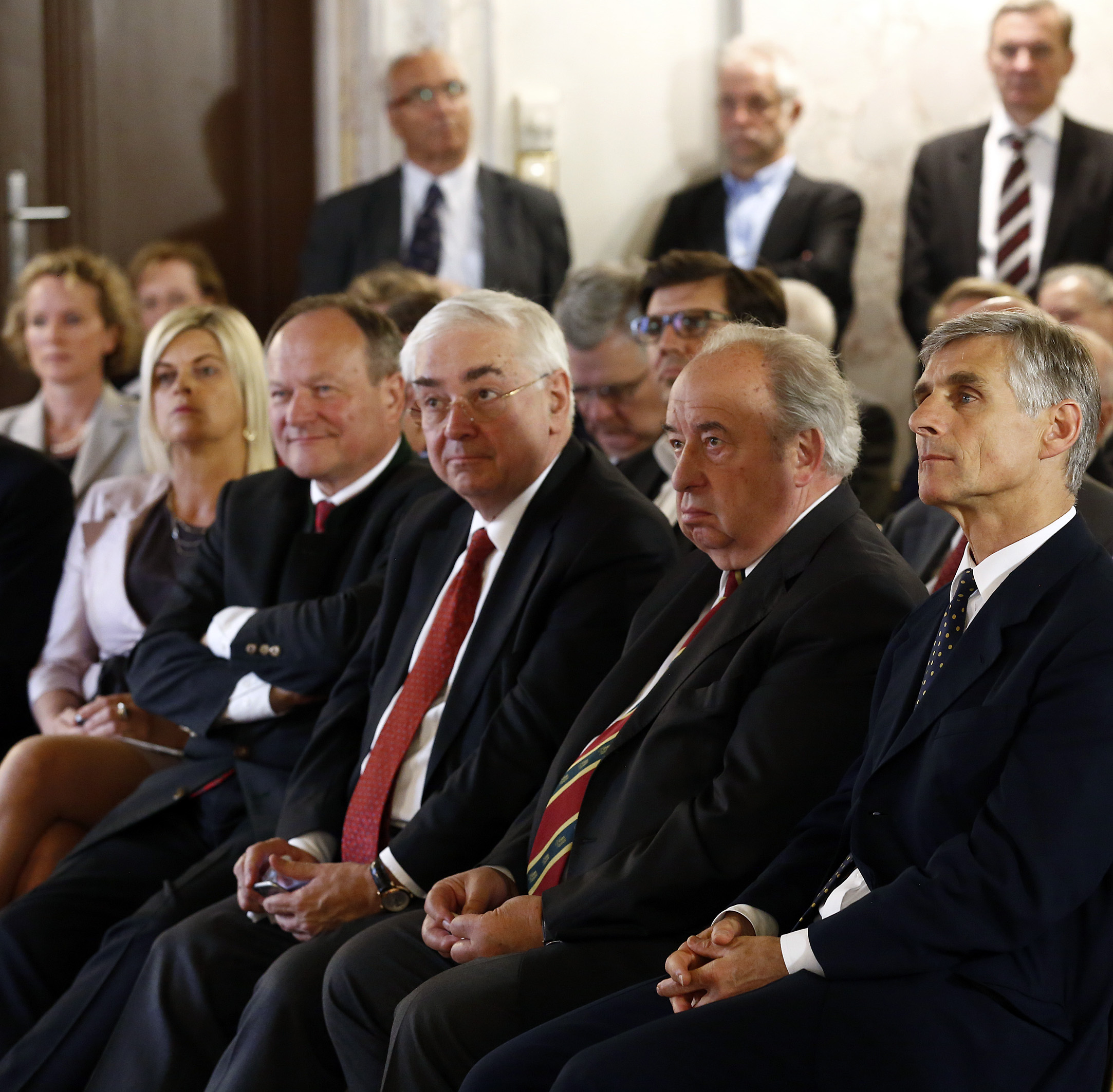 von links nach rechts: Hermann Schultes (Bauernbundobmann), Walter Rothensteiner (RZB), Fritz Neugebauer, Generalsekretär Michael Linhart